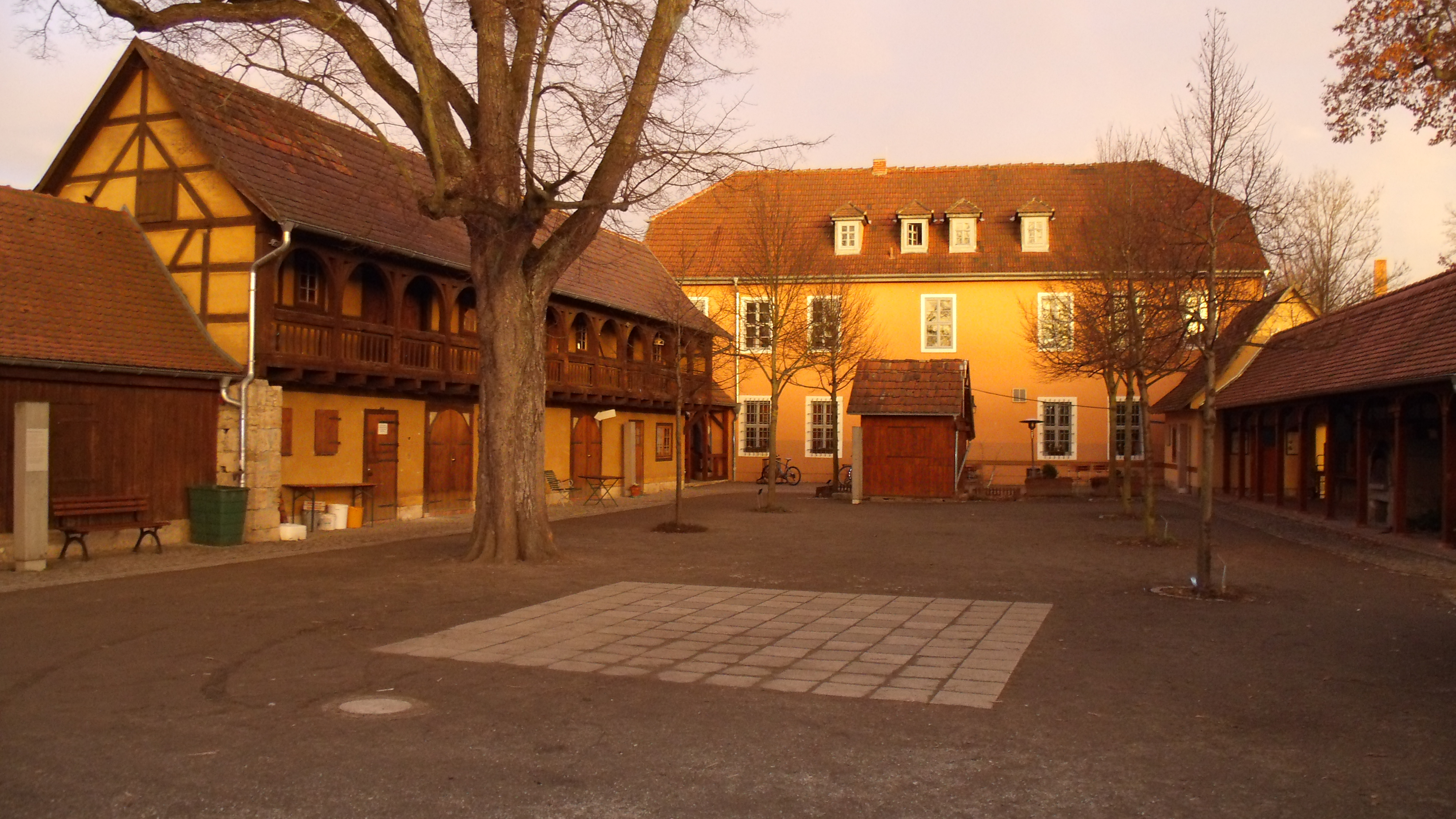 Innenhof des Deutschen Bienenmuseums in Weimar